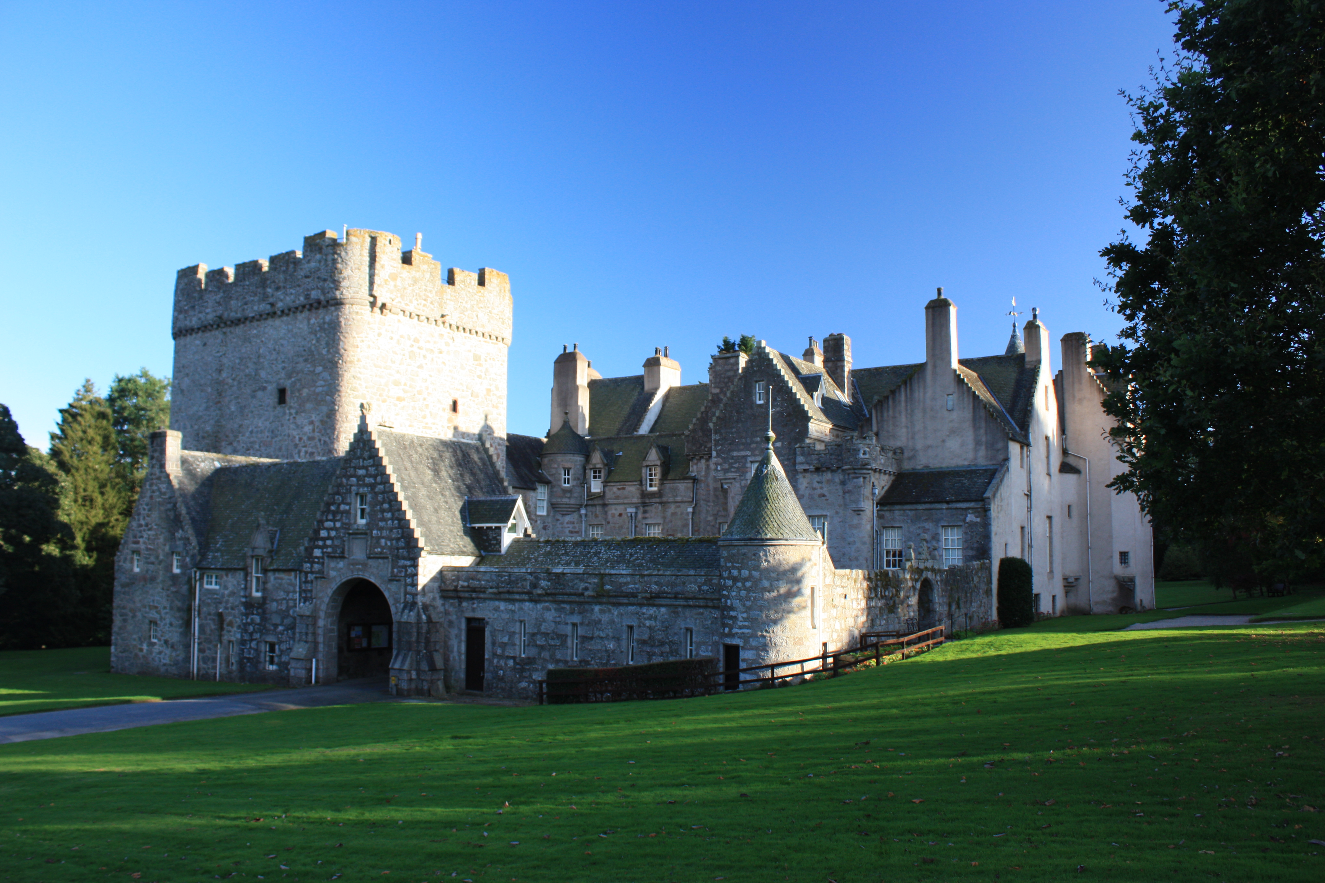 Drum Castle